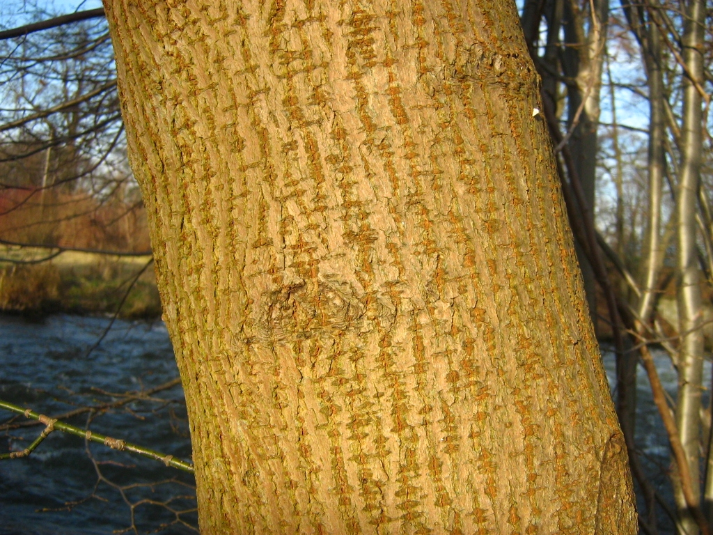 Acer negundo